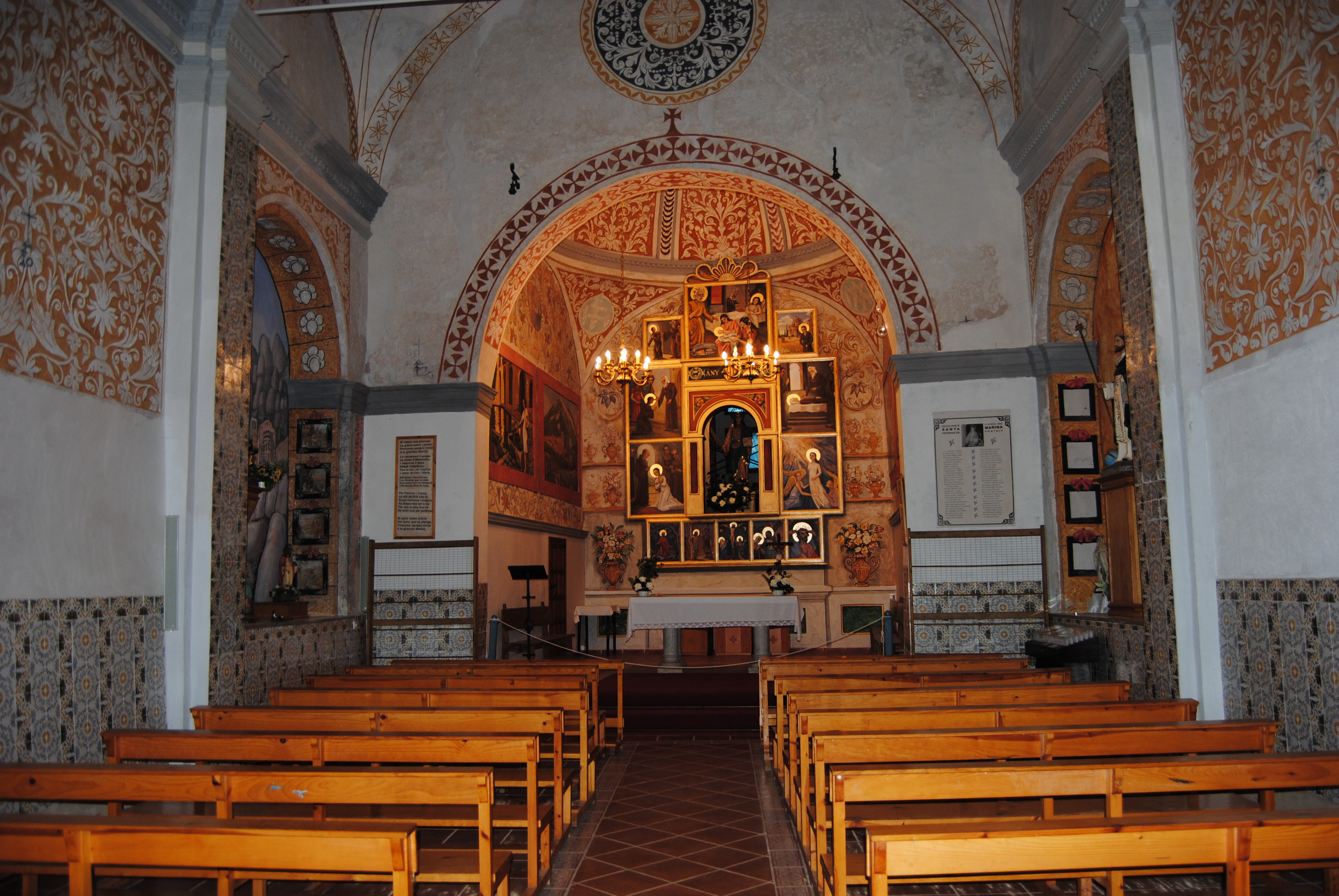 Interior de l'Ermita de Santa Marina, Pratdip, Tarragona.